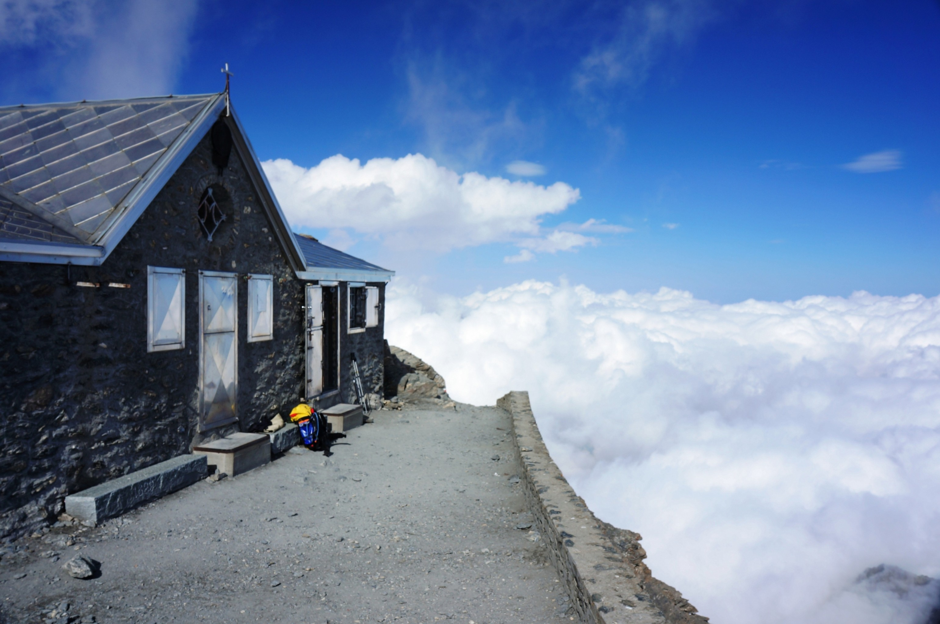 La chiesetta in vetta al Rocciamelone intitolato a Nostra Signora del Rocciamelone